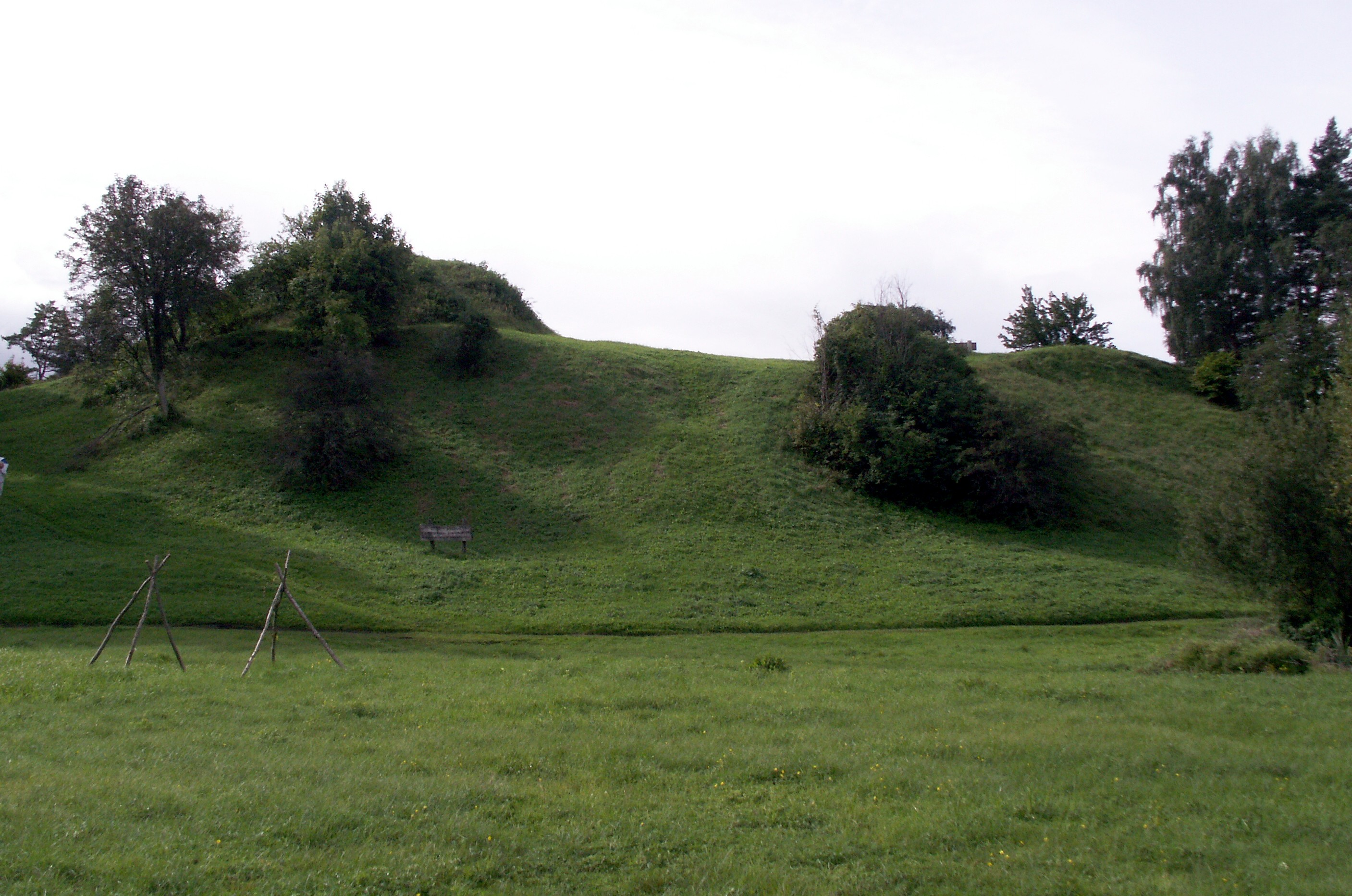 Tervetės piliakalnis, Tervetė, Tervetės pagastas, Latvija